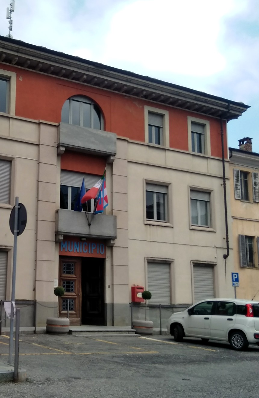 Paesana (CN): il municipio